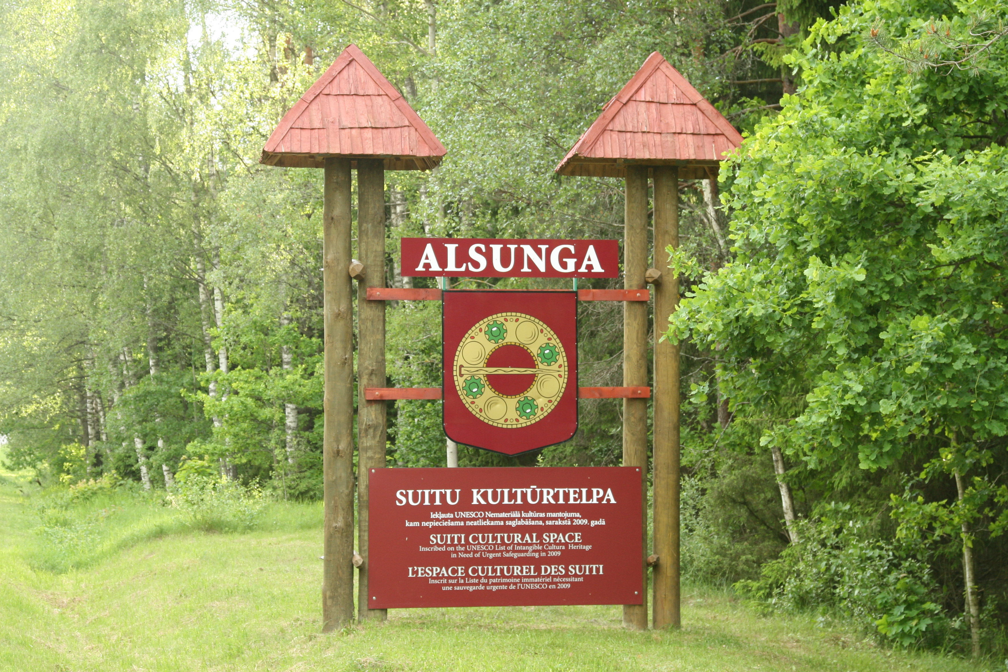 Alsunga